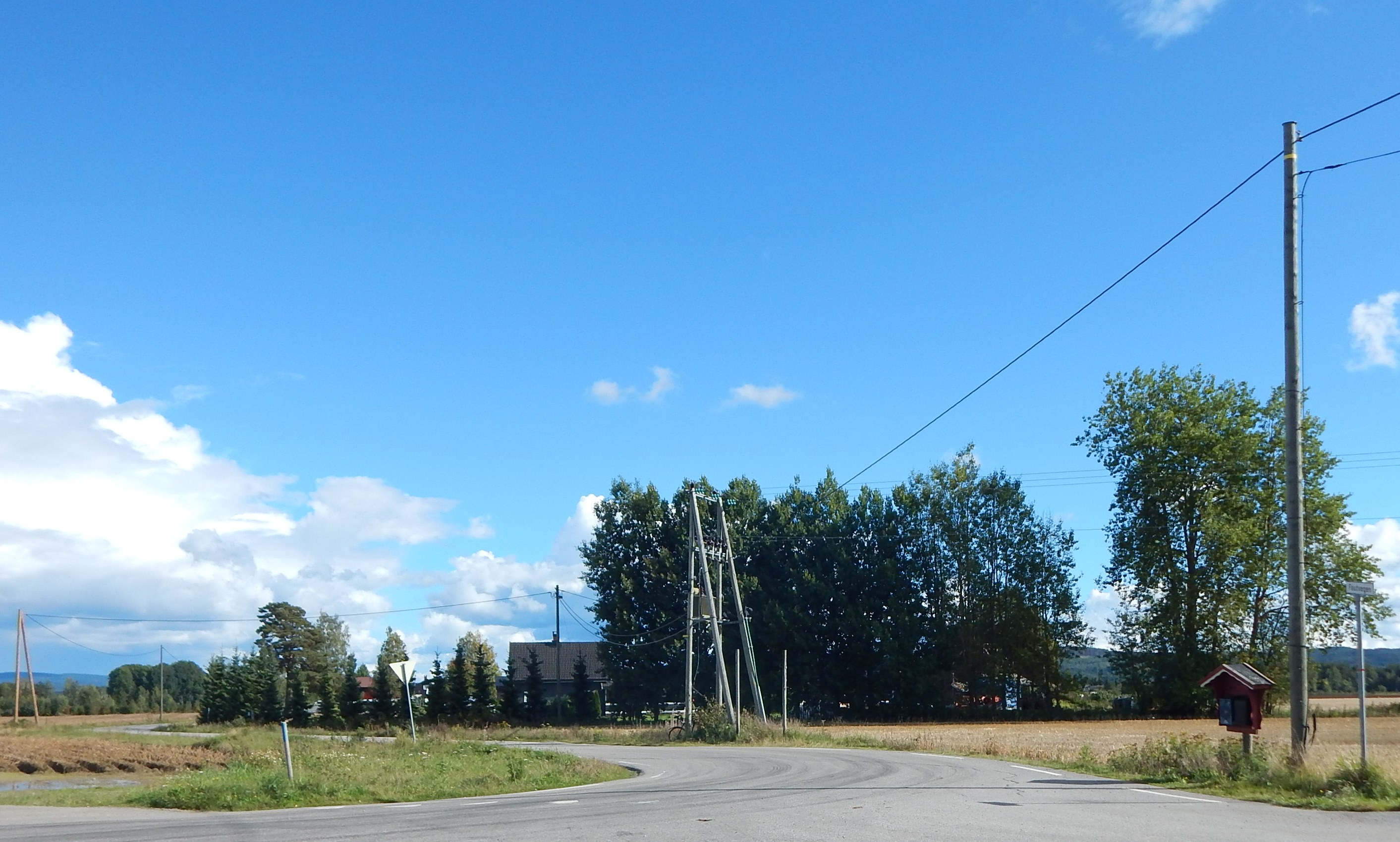 Fautvegen (fylkesvei 407) sett fra riksvei 2